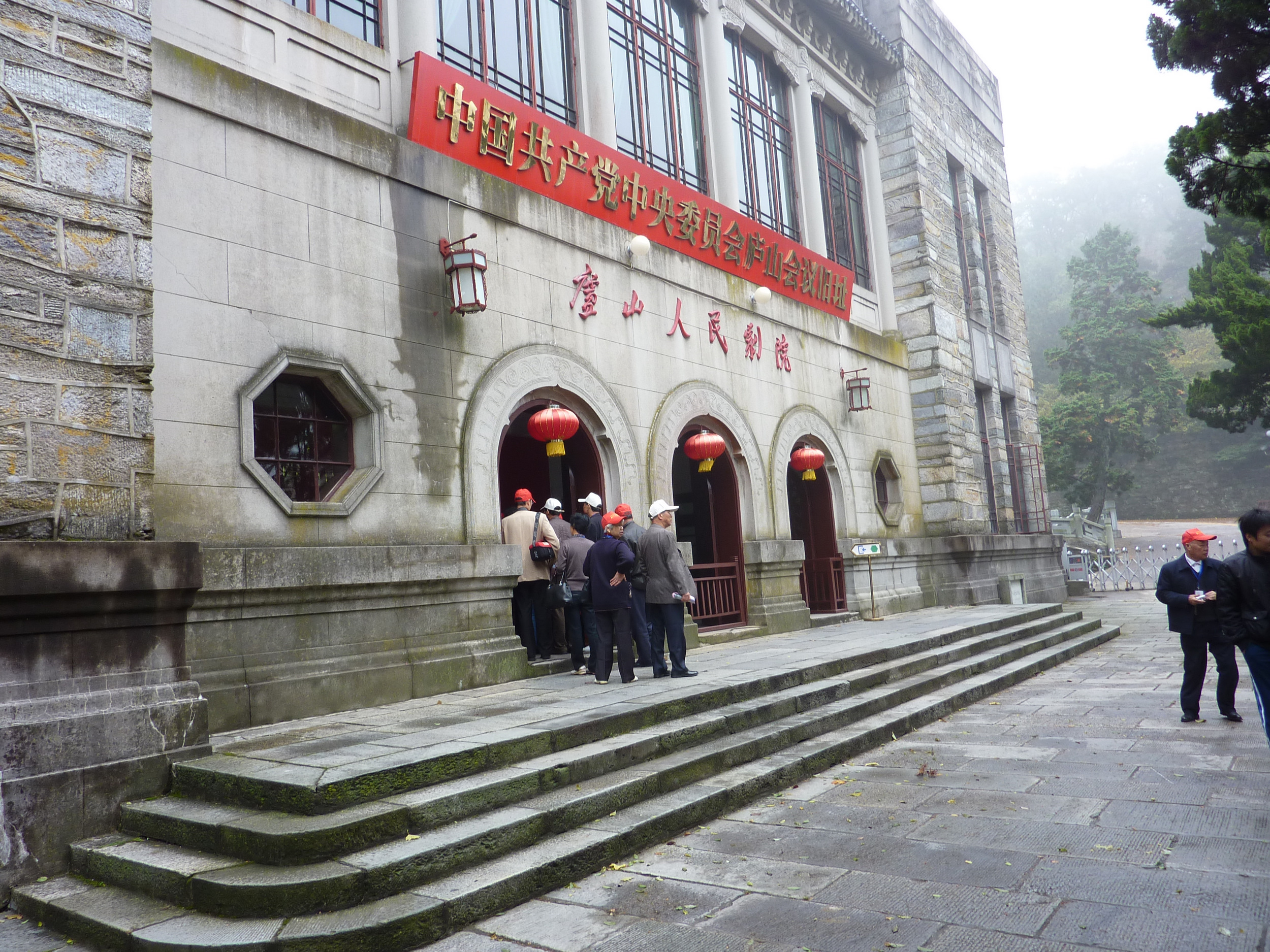 庐山会议旧址